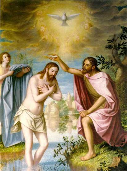 Bautismo de Cristo realizado por Juan Sánchez Cotán para la Cartuja de Granada. España